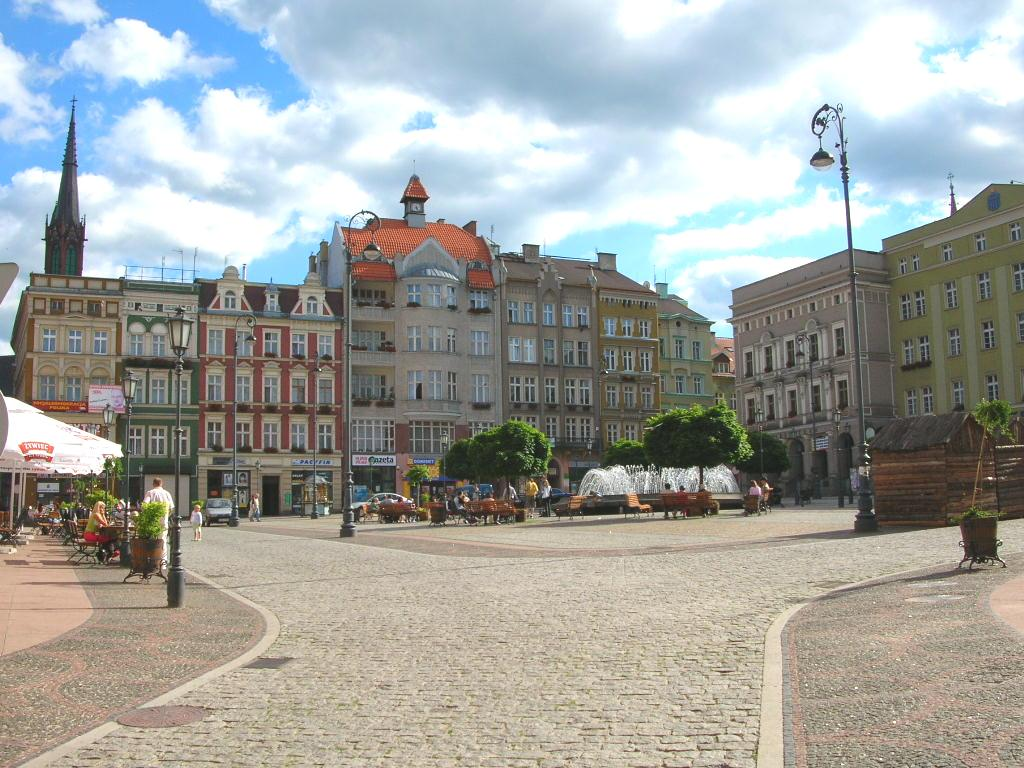 Wałbrzych - Rynek starego miasta.